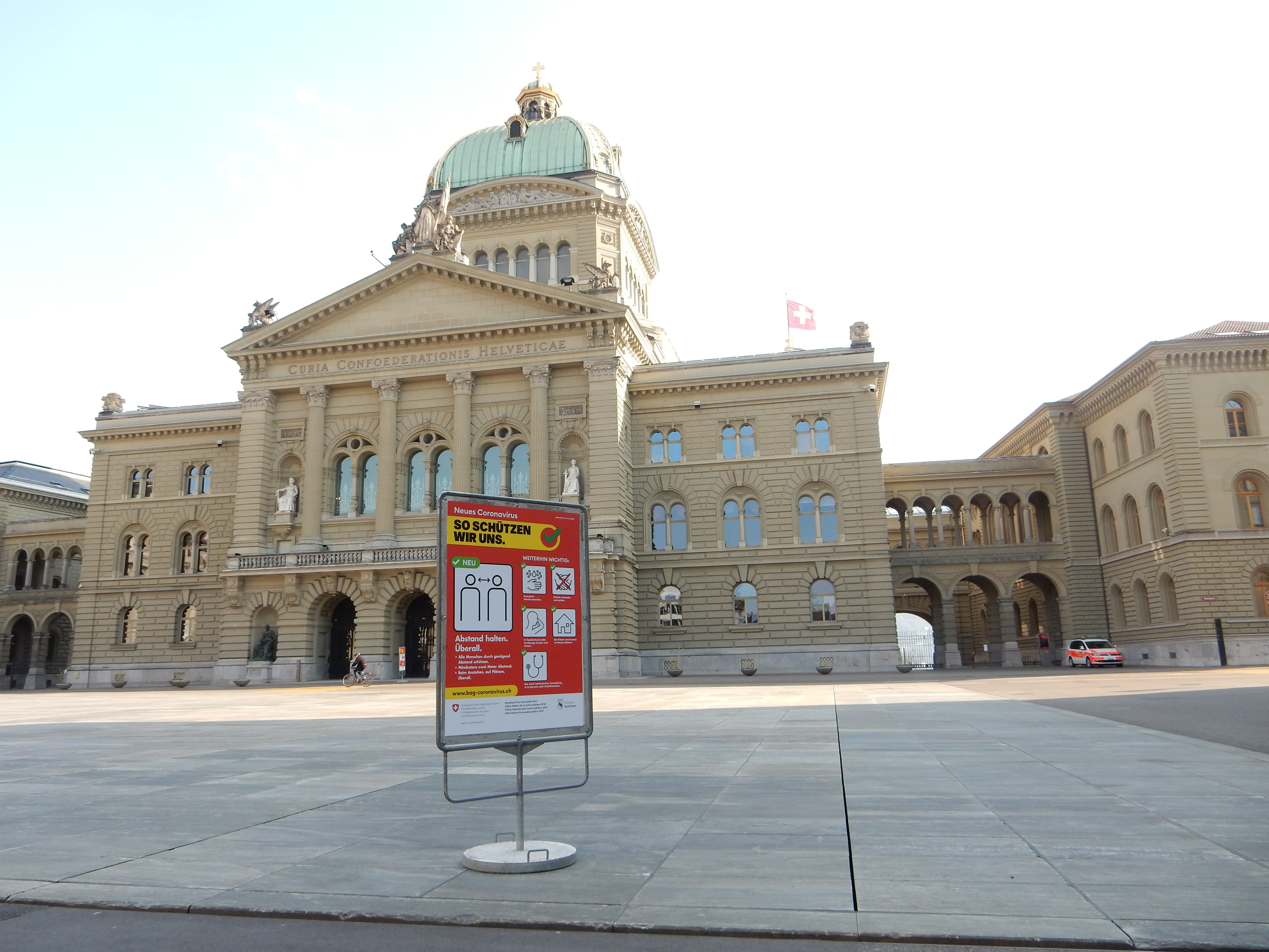 Bundeshaus Bern während COVID-19: Warntafel auf Bundesplatz, Polizeiauto und Sperrgitter Richtung Bundesterrasse